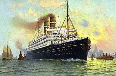 Passagierschiff Rotterdam der Holland America Line